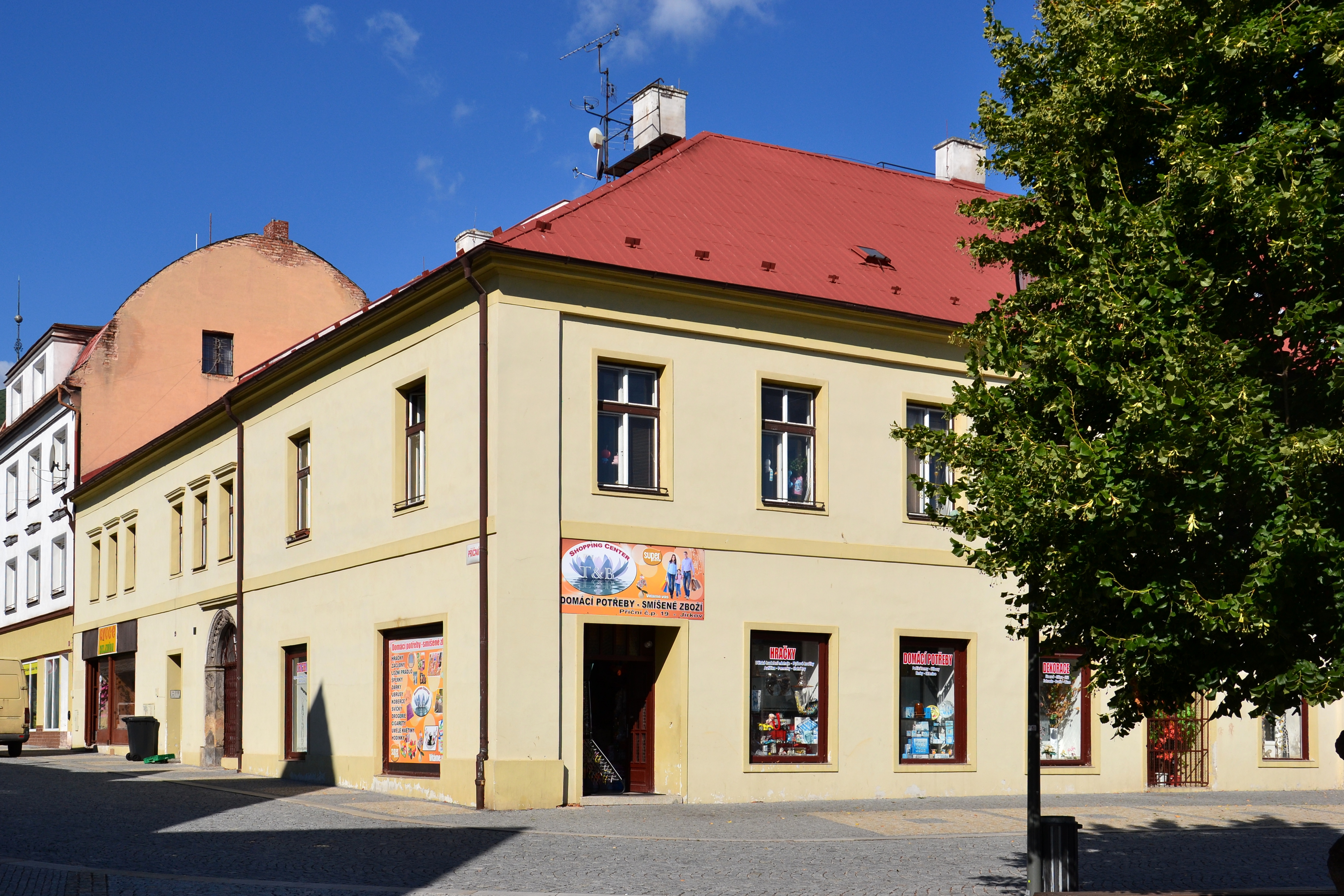 Dům čp. 19, Příčná 19/2, Jirkov.